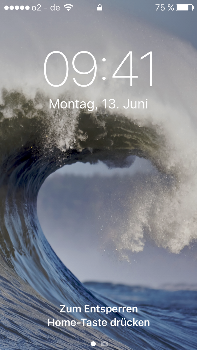 Lockscreen von iOS 10 auf einem iPhone 5s